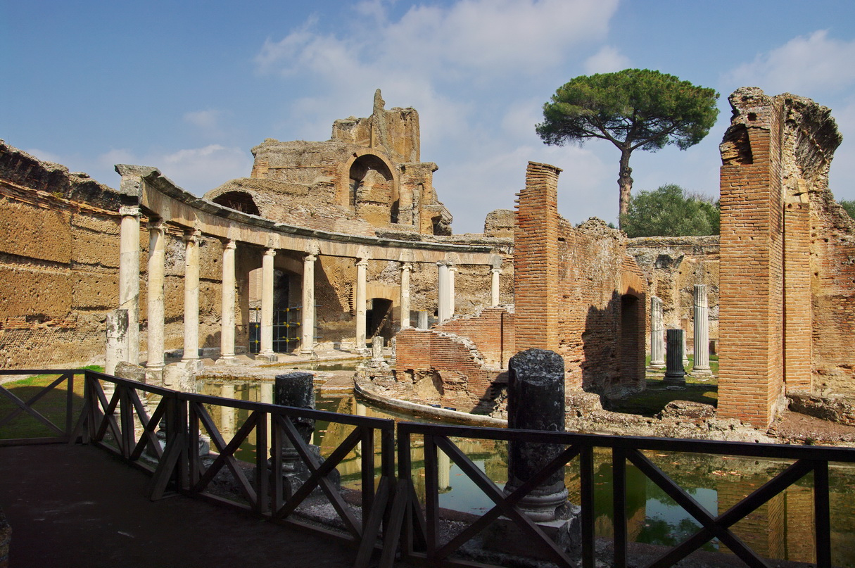 Villa Adriana: Teatro Maritimo, Tivoli